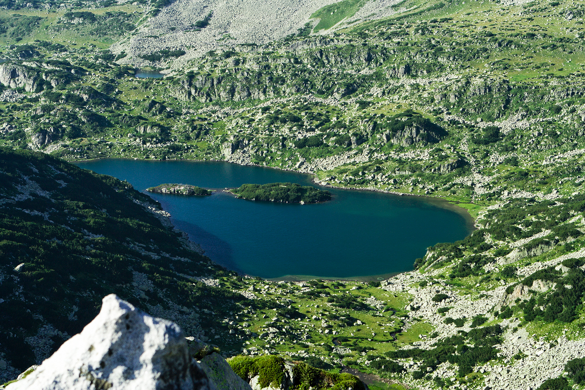 Голямото Валявишко езеро, гледано от превала в. Валявишки чукар - в. Момин Двор.